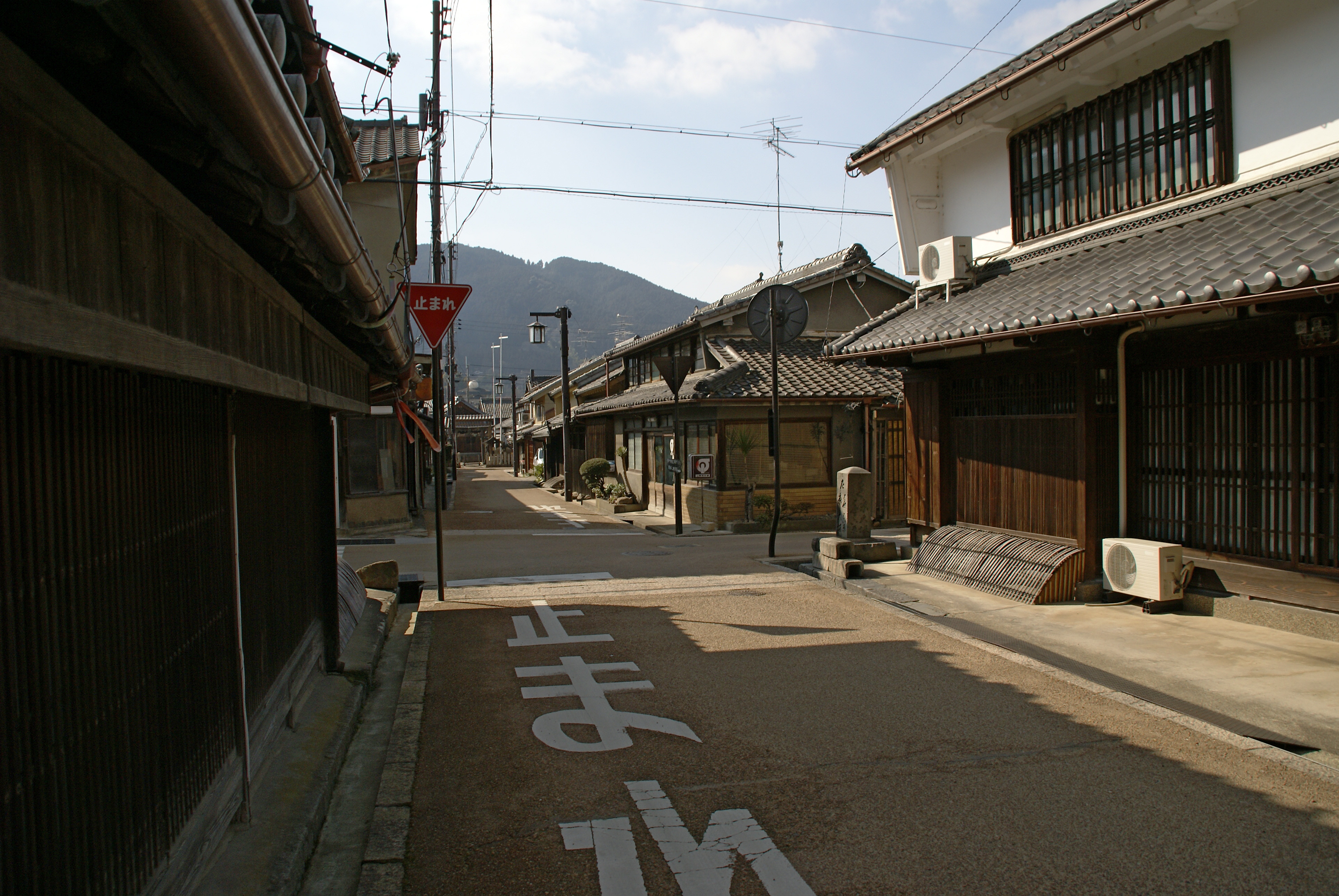 Matsuyama in Uda, Nara prefecture, Japan